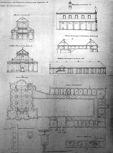 Беларуская (тарашкевіца): Вістычы (Vistyčy). Касьцёл Сьвятой Соф'і і кляштар цыстэрыянаў. Абмеры